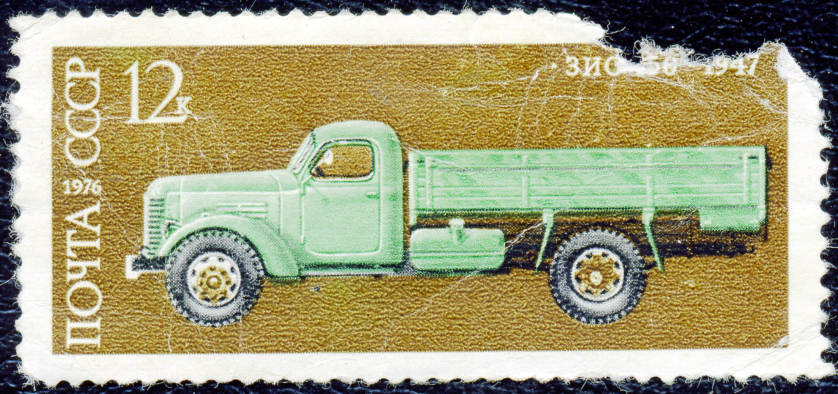 Почтовая марка СССР. 1976. Зис